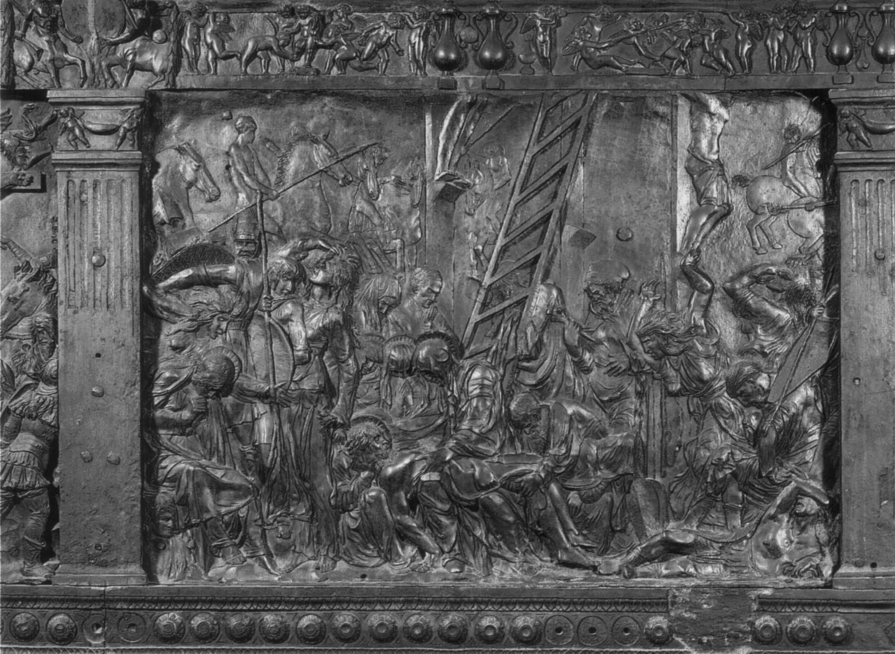 Il Pulpito della Passione, in San Lorenzo a Firenze, opera di Donatello. Dettaglio: Deposizione. Fotografia Alinari, 1852.